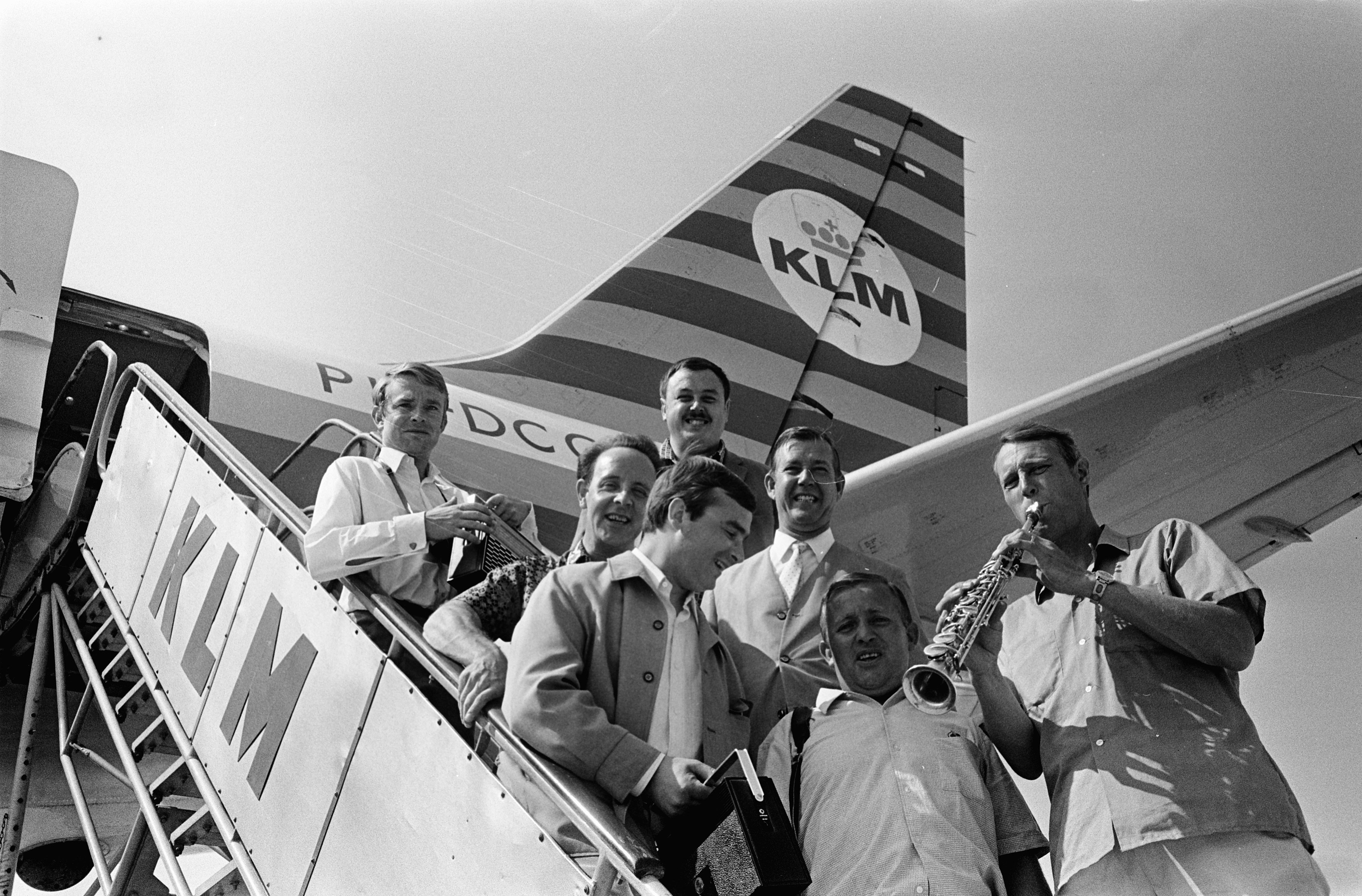 Dutch Swing College Band vertrekt vanaf Schiphol naar het Verre Oosten. De bandleden op de vliegtuigtrap, rechts bandleider Peter Schilperoort